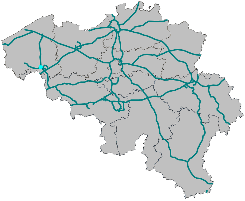 Belgische snelwegen, Knooppunt Moorsele